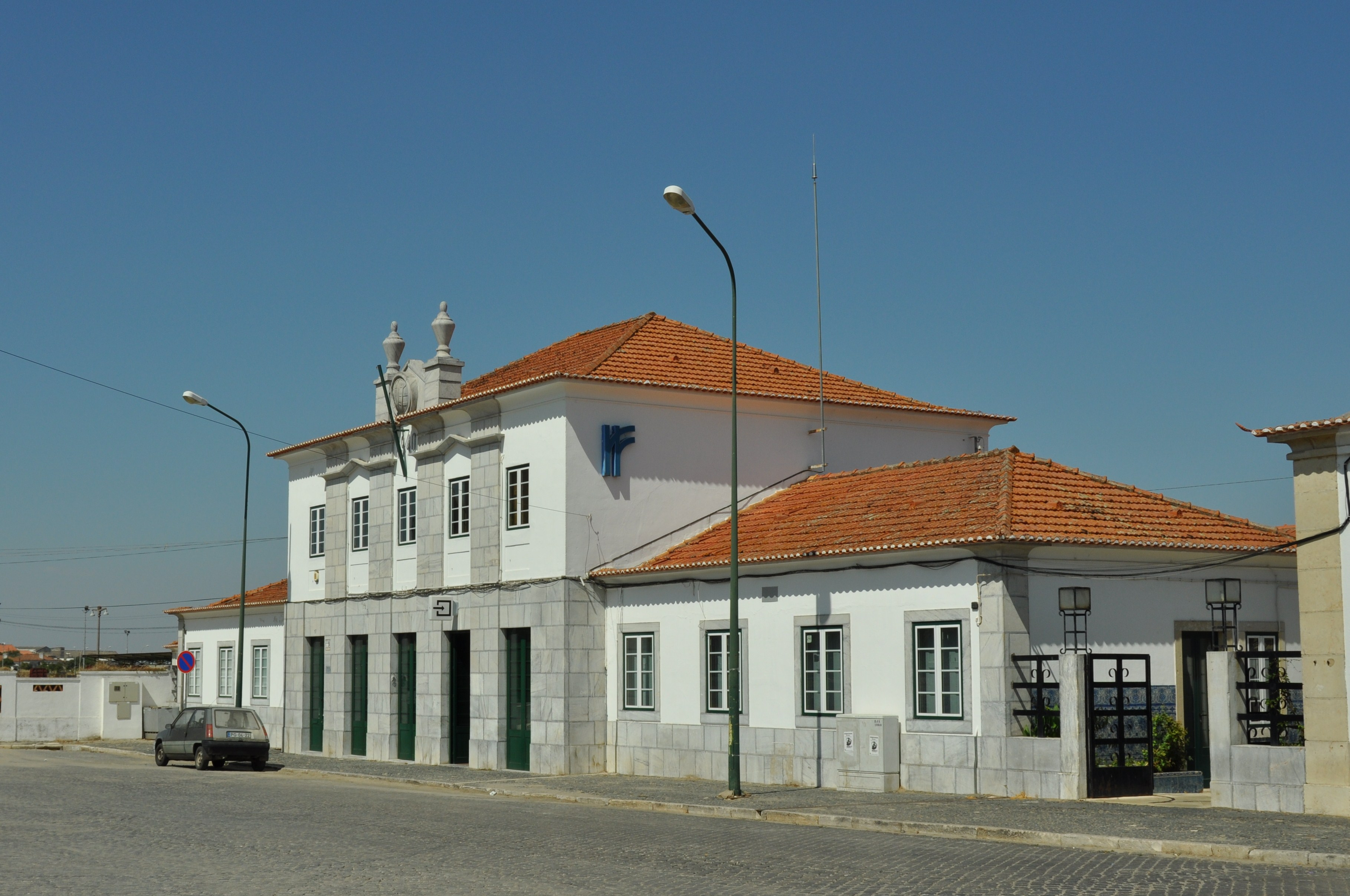 Edifício Principal da Estação de Beja